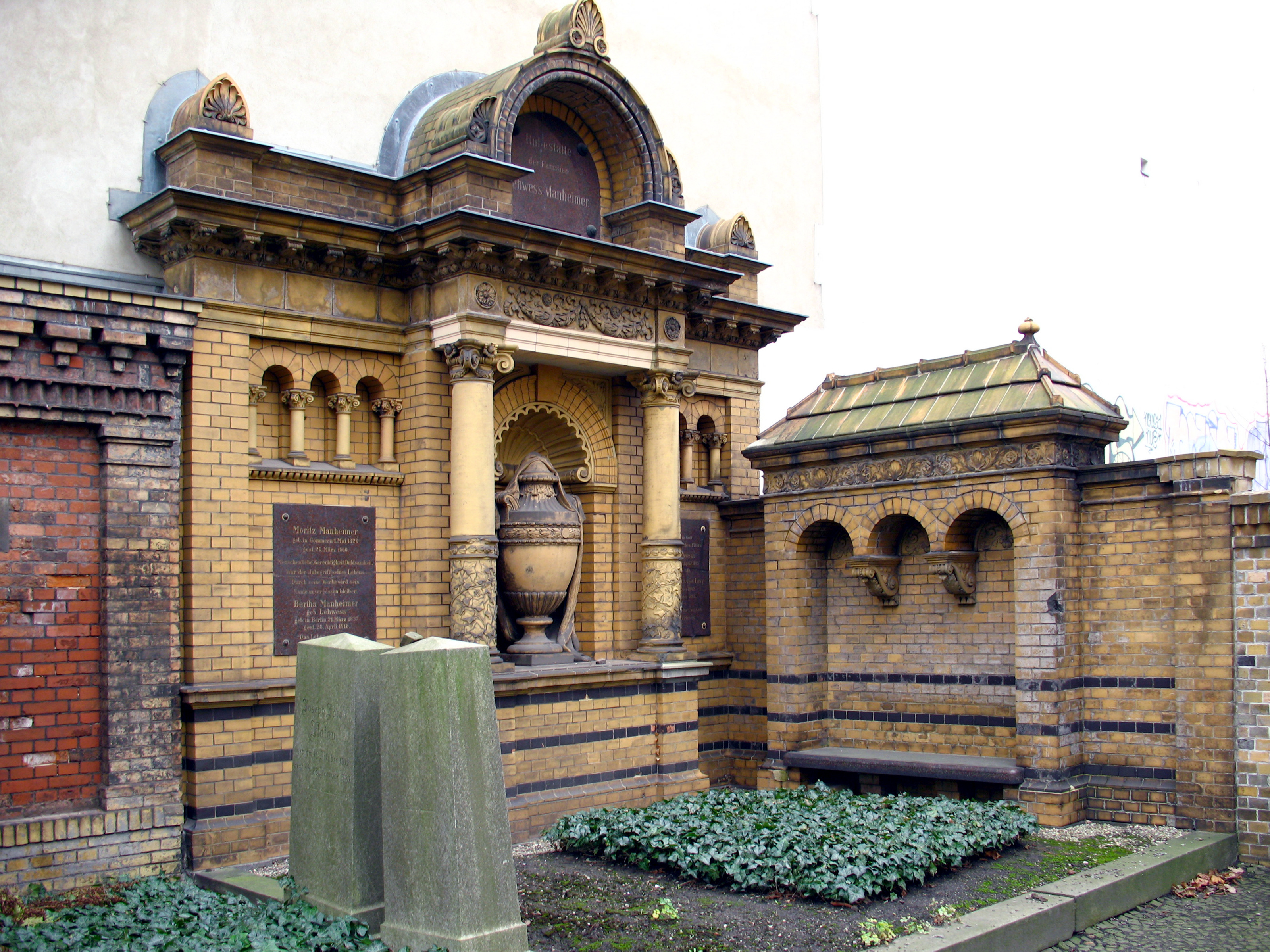 Alter Jüdischer Friedhof, Berlin-Prenzlauer Berg. Grabstätte Manheimer.